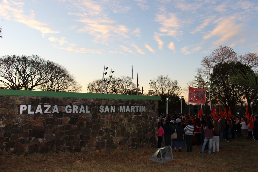 Plaza General San Martín, en la localidad de Gobernador Roca, Misiones, Argentina.